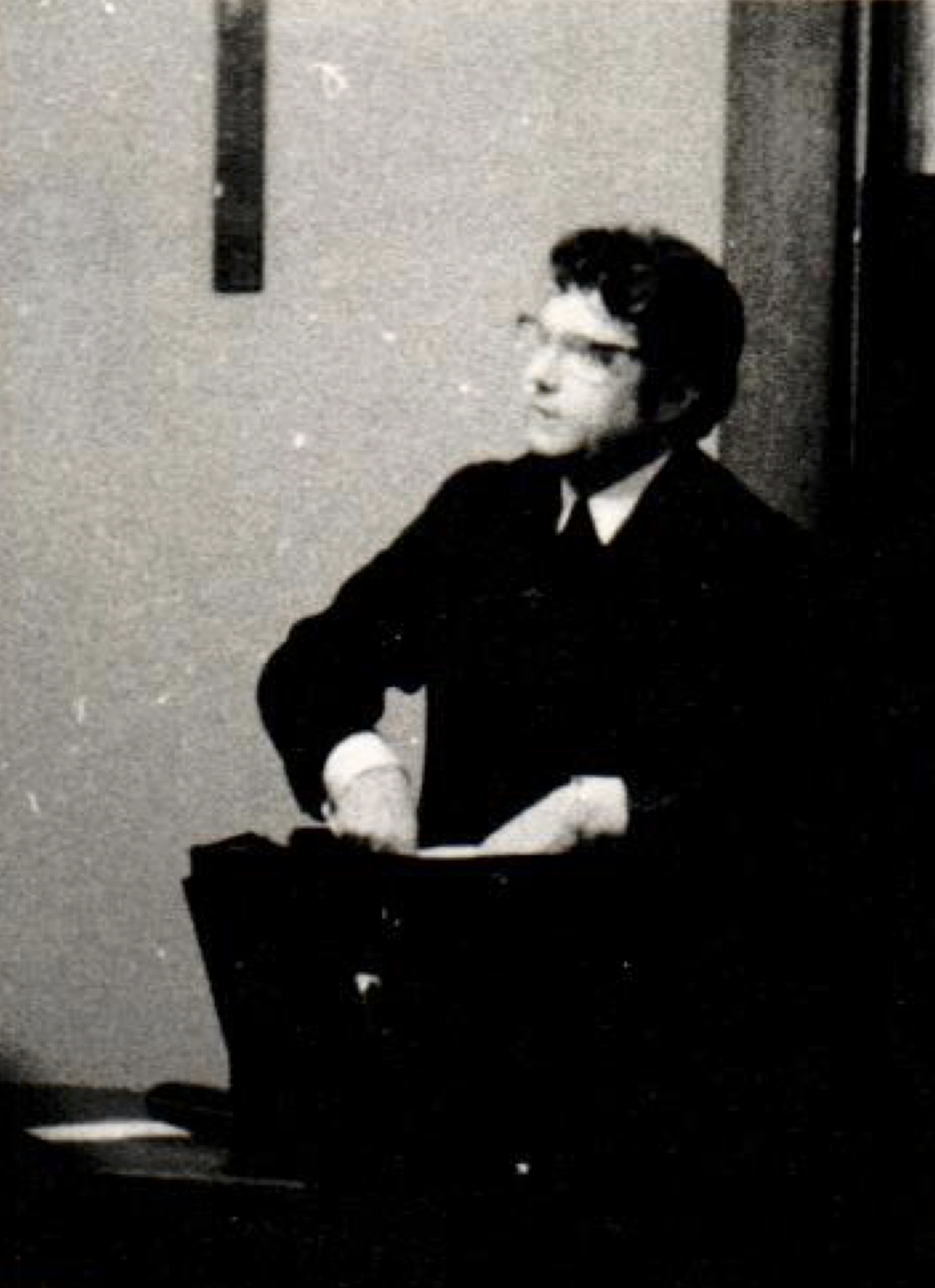 Vyučující pastorální teologie na Cyrilometodějské bohoslovecké fakultě v Litoměřicích Dr. Vladimír Benda. Autorem fotografie je Vladimír Gajdušek, který jako student udělal foto z lavice při vyučování.